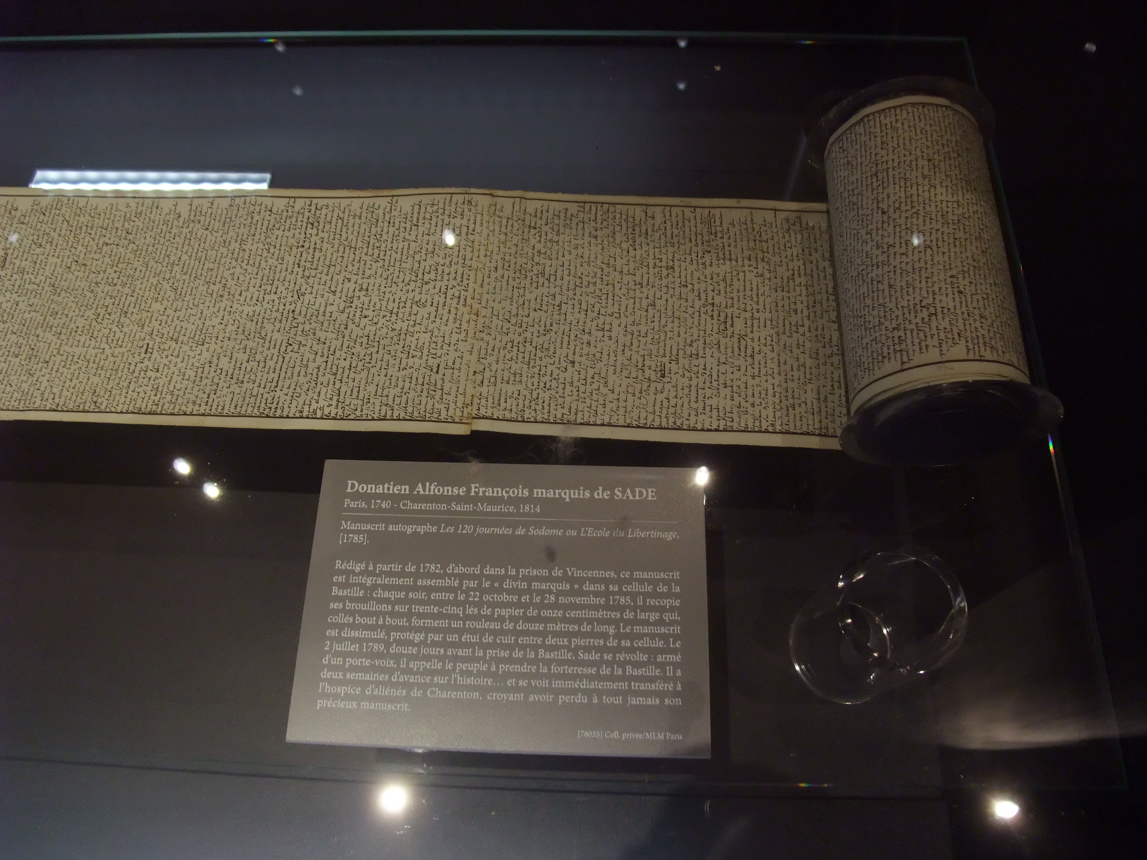 Exposée en 2014 au Musée des lettres et manuscrits de la société Aristophil au 222 boulevard Saint-Germain.